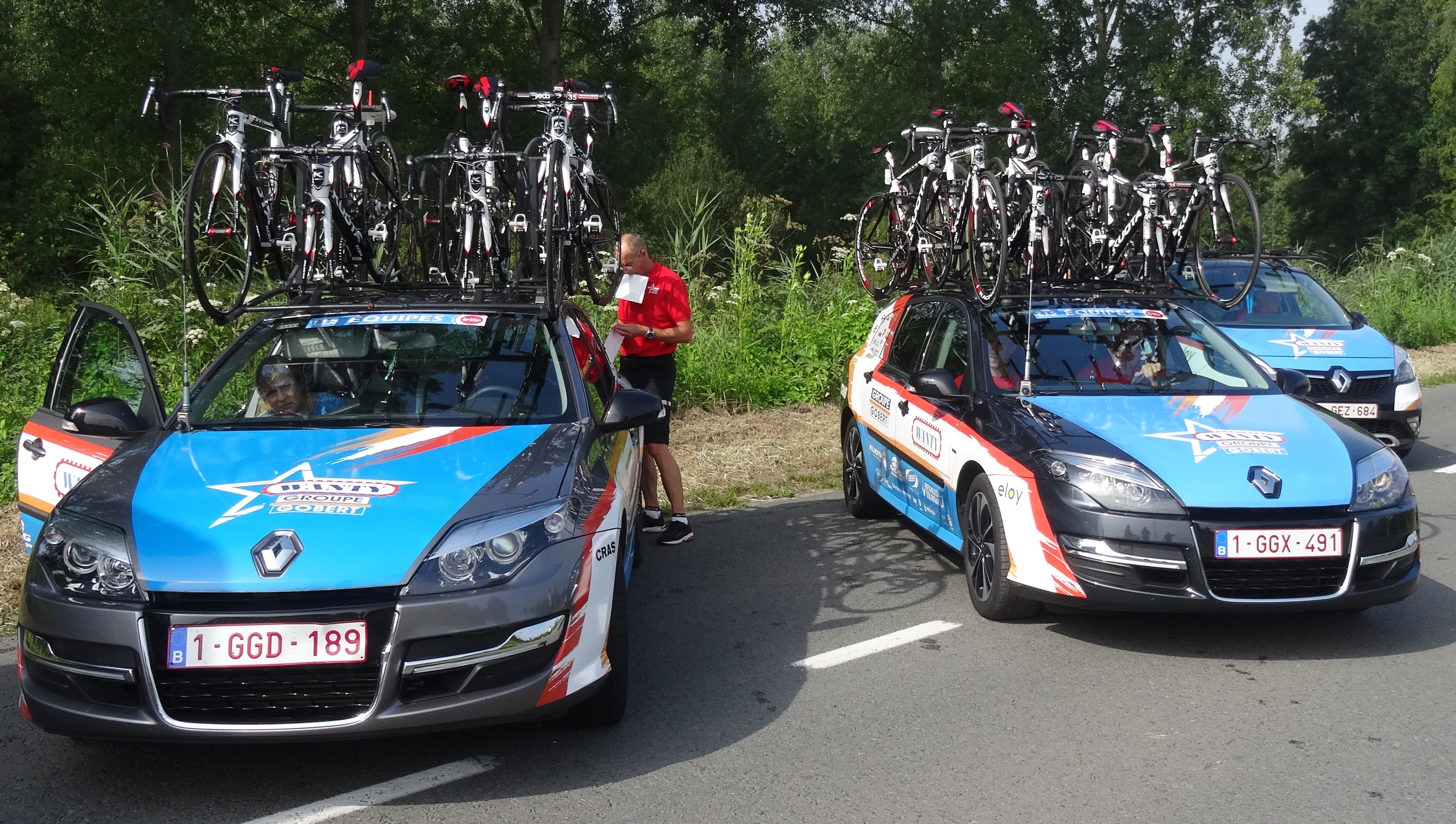 Reportage photographique réalisé le dimanche 27 juillet à l'occasion du départ de la deuxième étape du Tour de Wallonie 2014 à Péronnes-lez-Antoing (Antoing), Belgique.